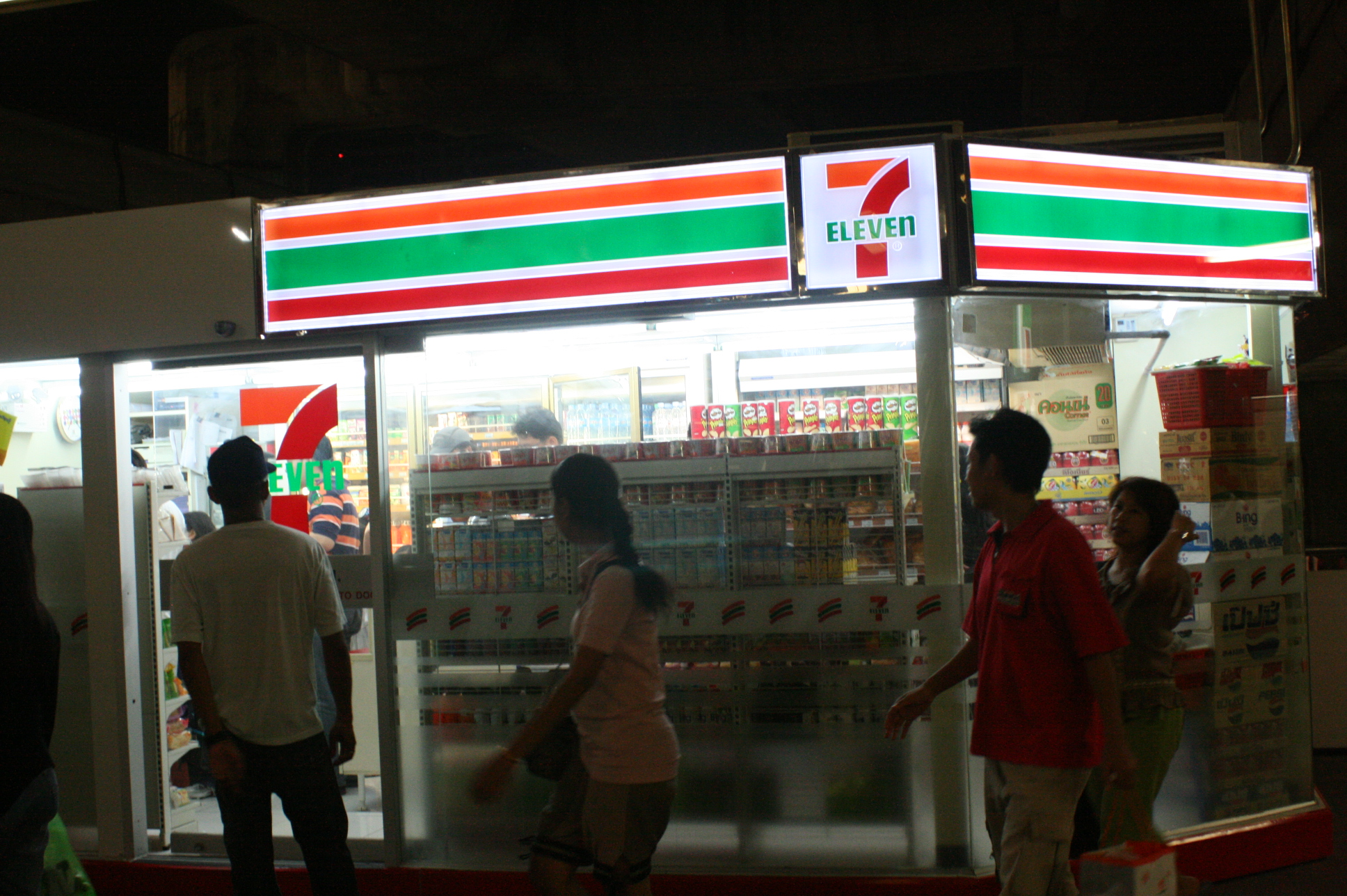 7-Eleven in Siamsquare ,Bangkok